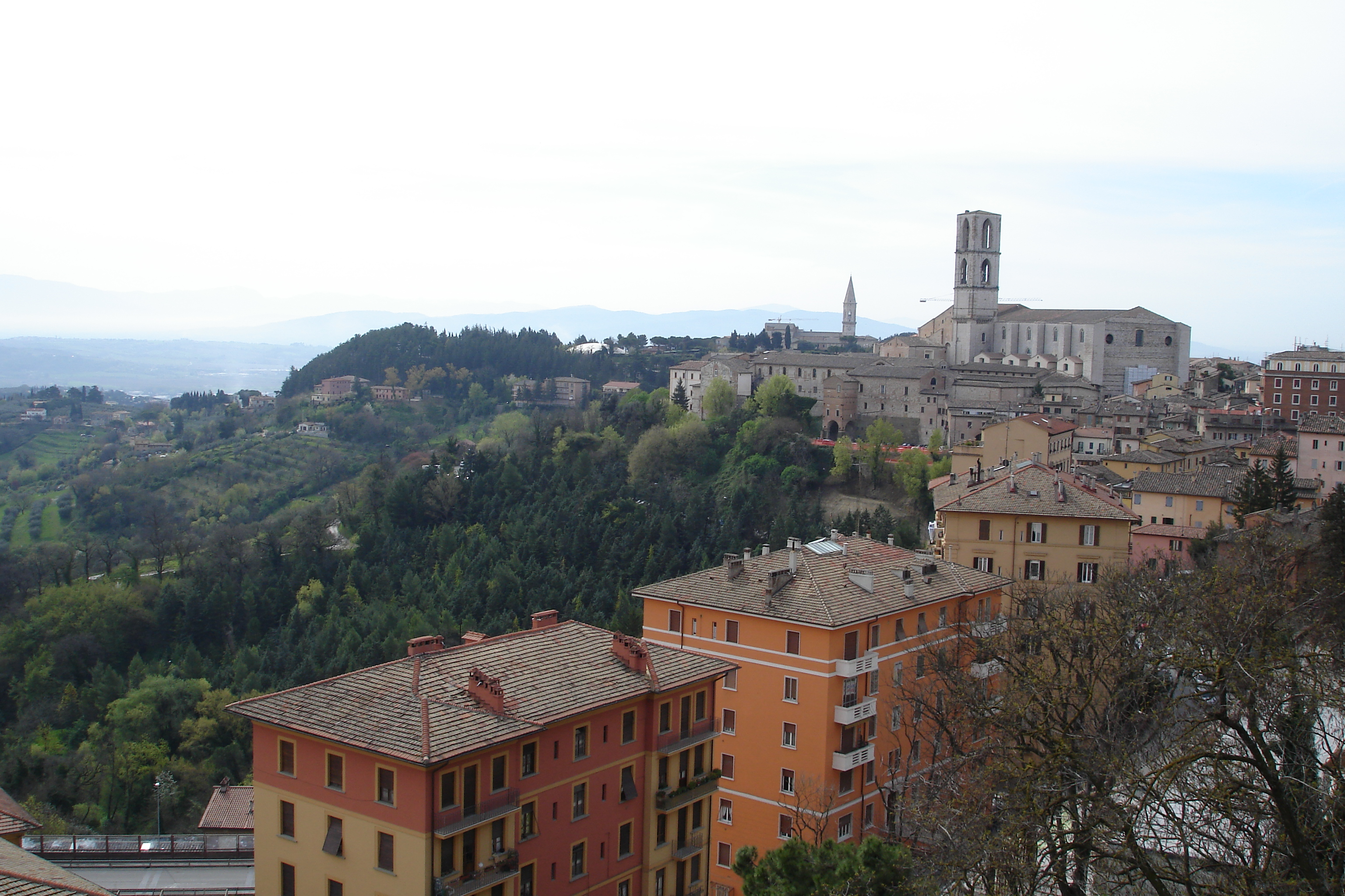 Vue Perouse (Italie)